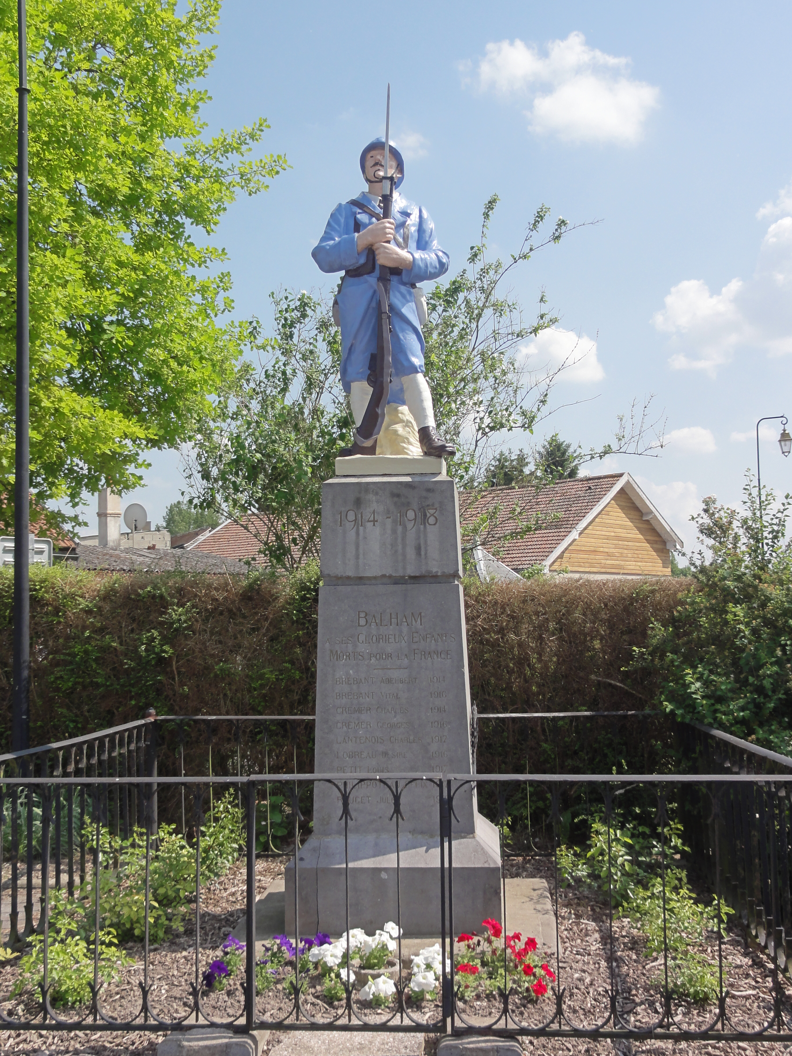 Balham (Ardennnes) Monument aux morts